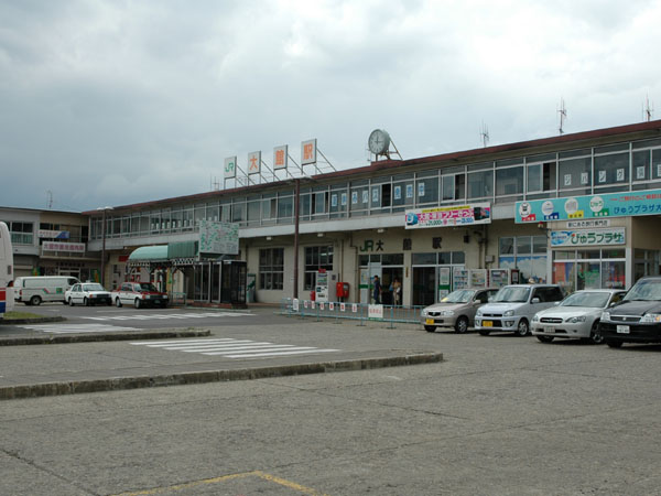 JR大館駅